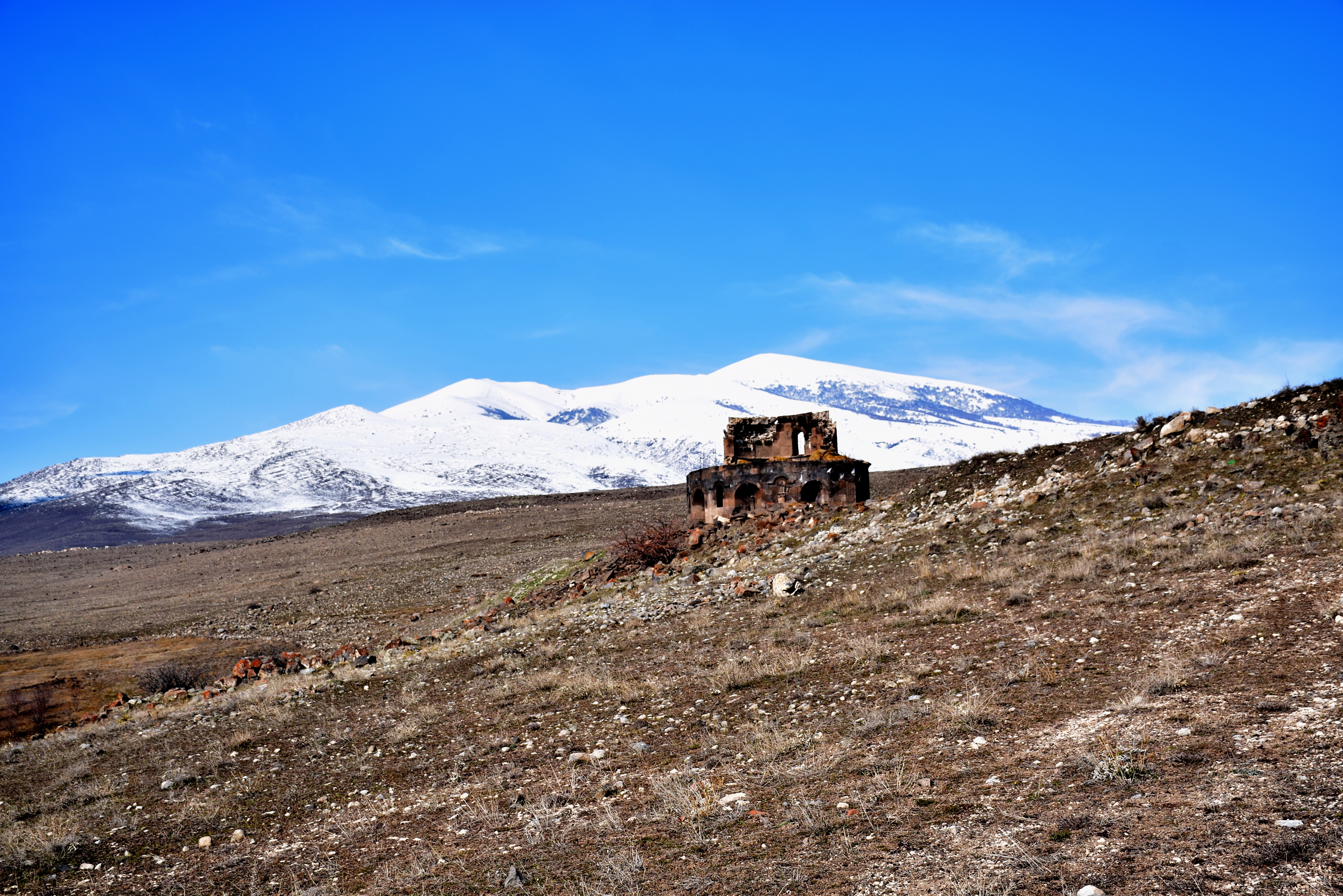 Photo by Ճանապարհորդ ակումբ 31/2.1